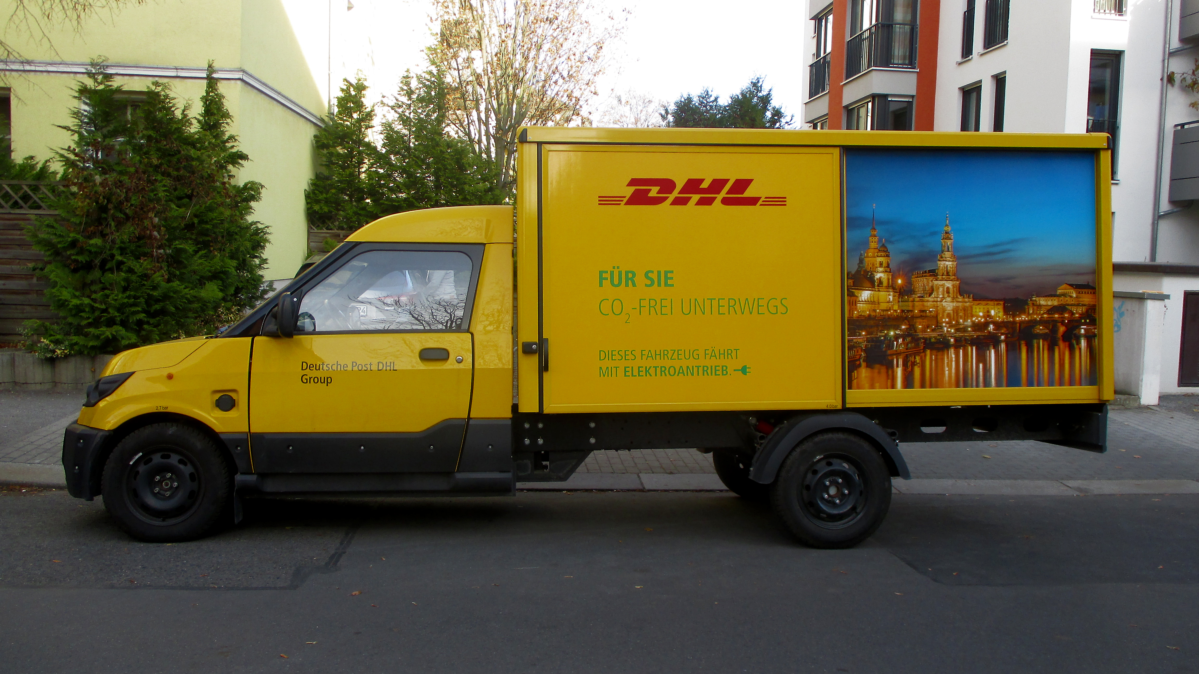 Streetscooter der Deutschen Post DHL in Dresden